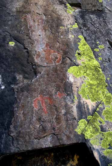 Петроглифы на склоне Титовской Сопки